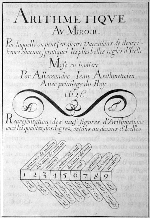 Page de titre du traité d'Arithmétique d'Alexandre jean, 1636.